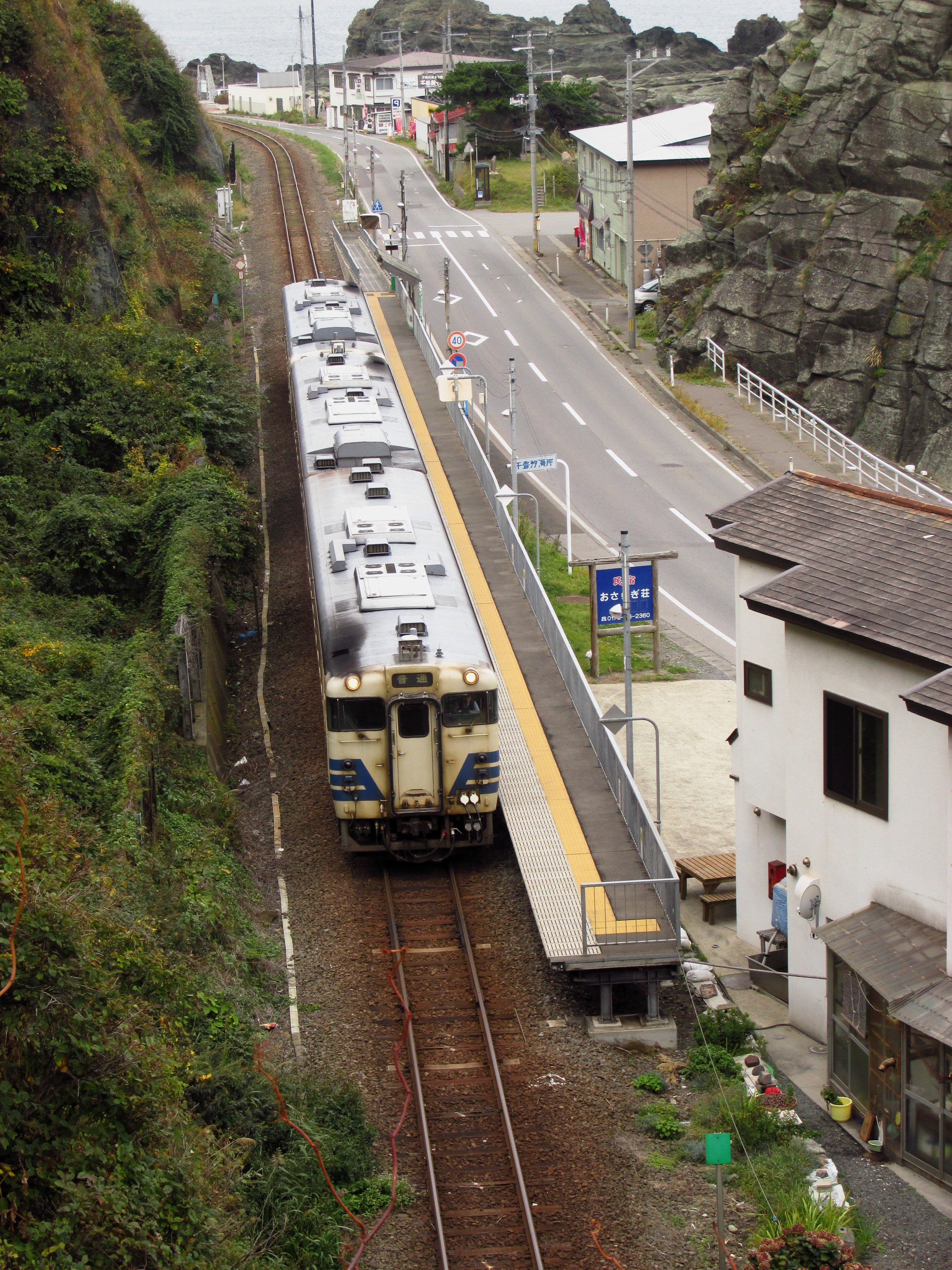 日本国,青森県西津軽郡深浦町千畳敷,JR五能線,千畳敷駅と３両編成のディーゼル気動車